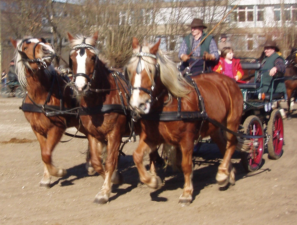 Schwarzwälder in Troikaanspannung